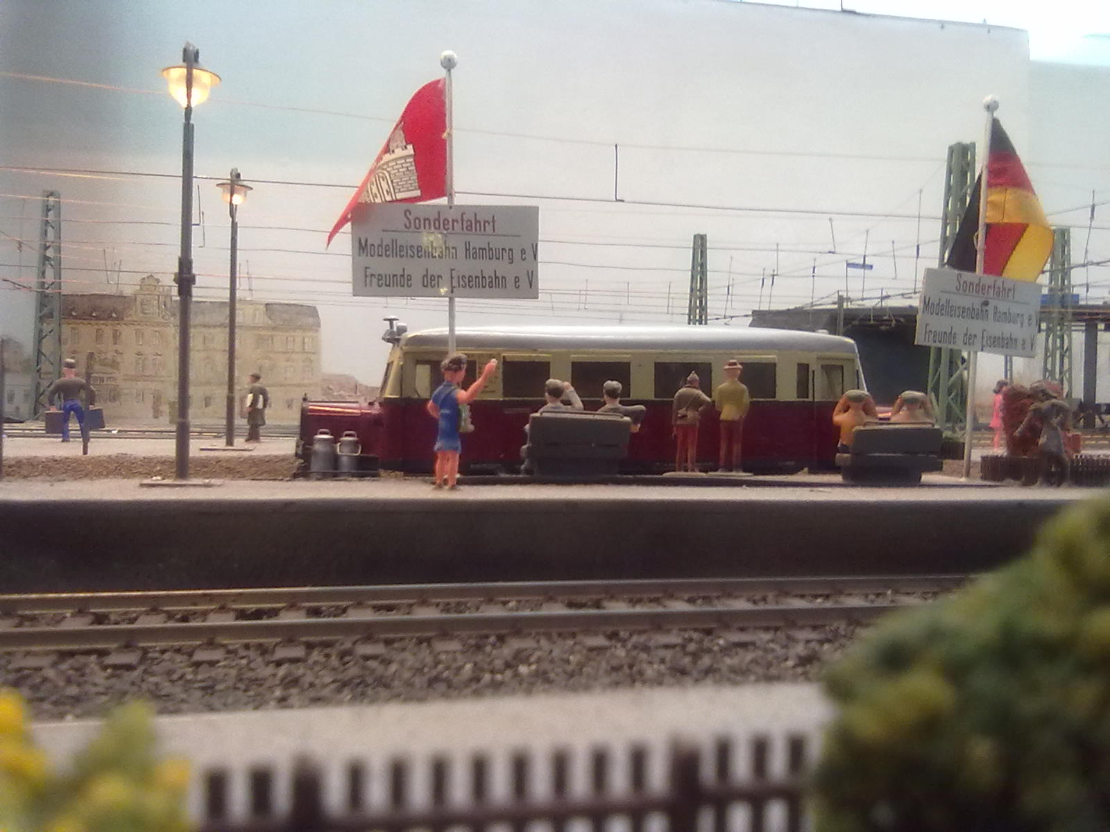 Wismarer Triebwagen (Ameisenbär) am Sonderbahnsteig Hamburg- Harburg der Mehev Modelleisenbahn Spur 1 Anlage